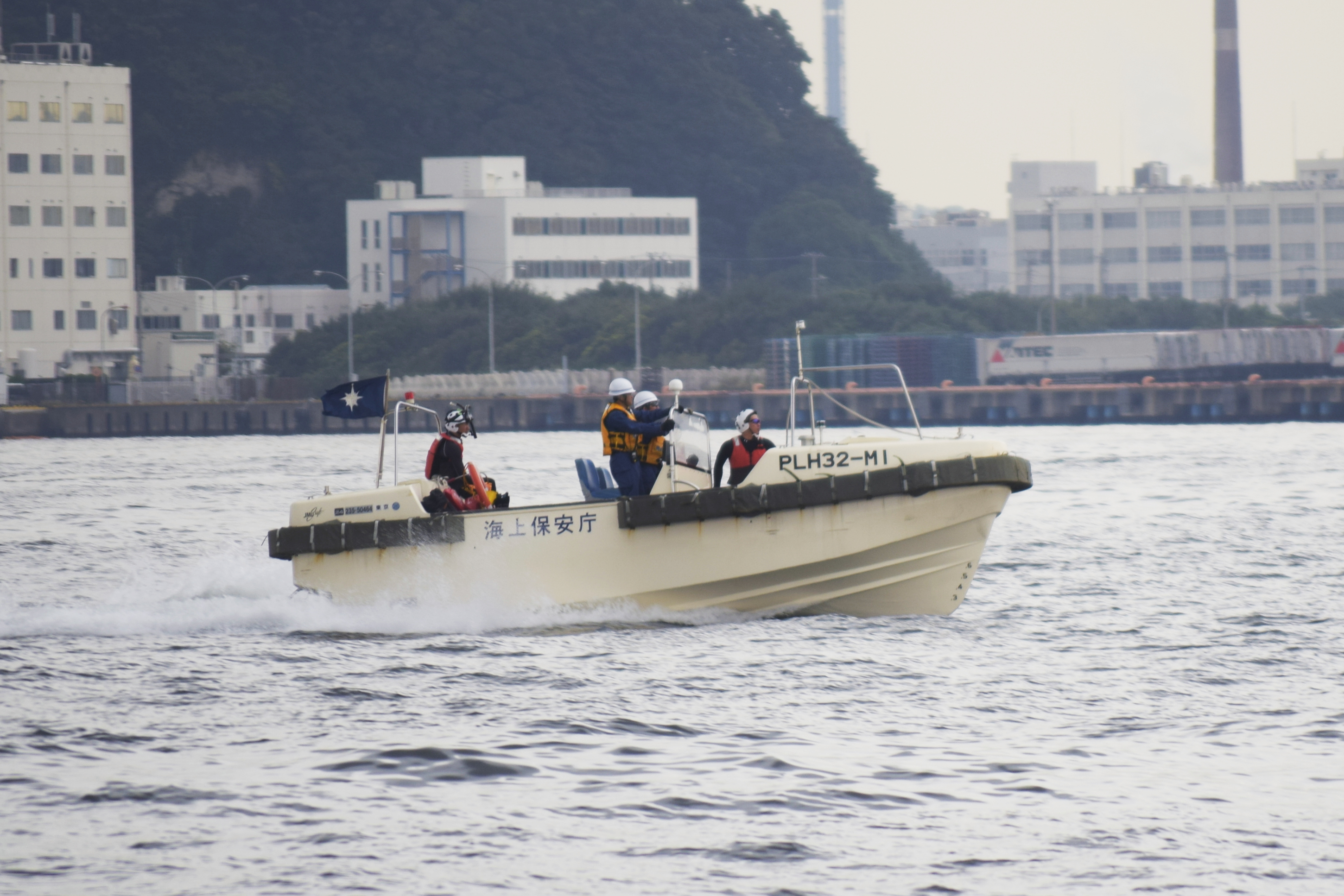 原子力空母「ロナルド・レーガン」入港に伴い、横須賀港内で警備を行う巡視船「あきつしま」搭載7メートル型高速警備救難艇。